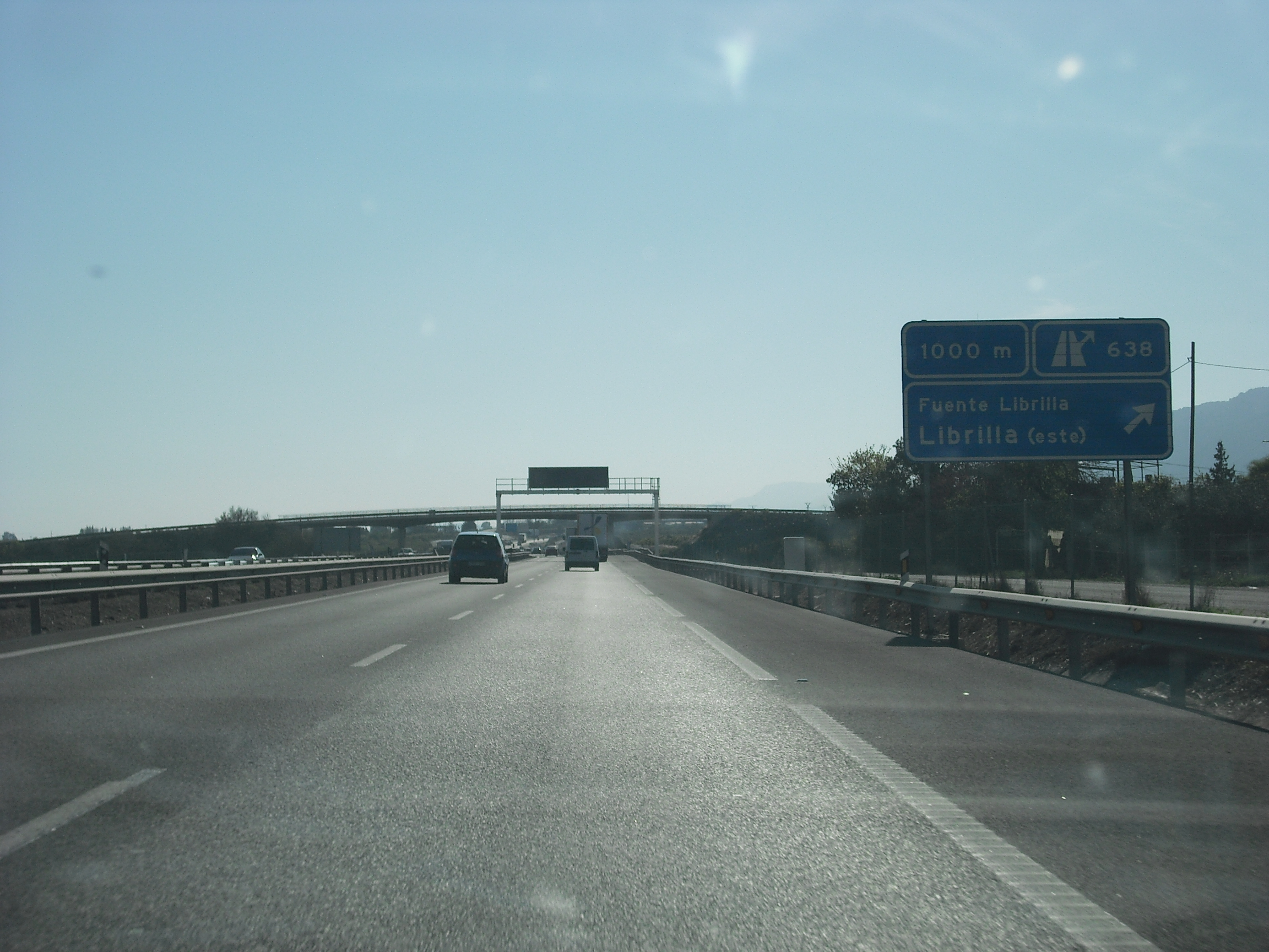 Autovía del Mediterráneo a su paso por Librilla